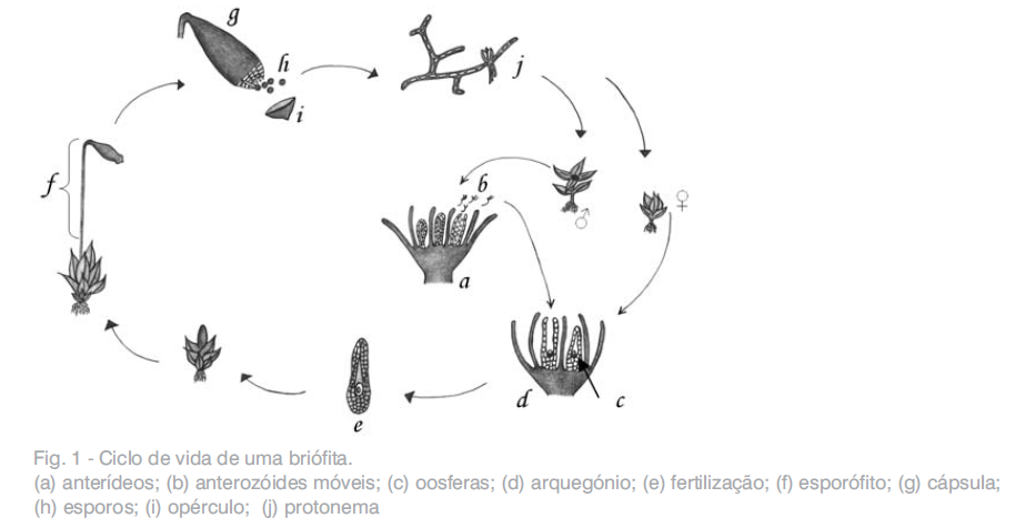 Imagem do ciclo de vida dos musgos